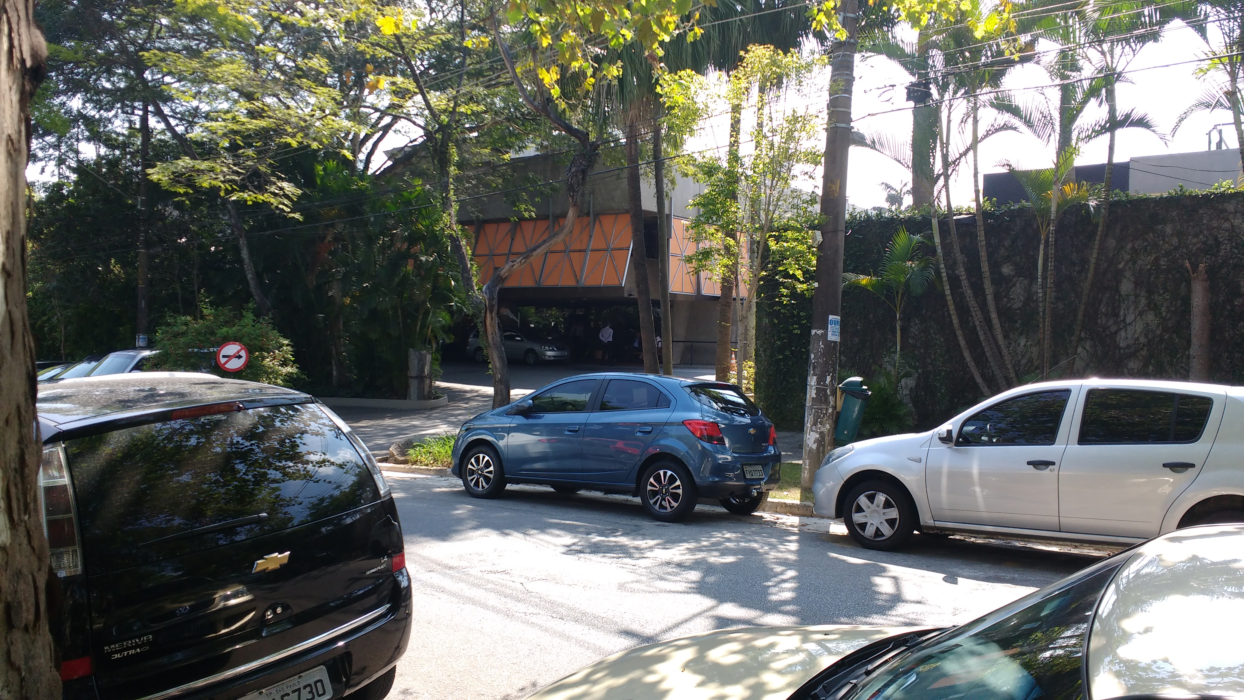 Visão da rua